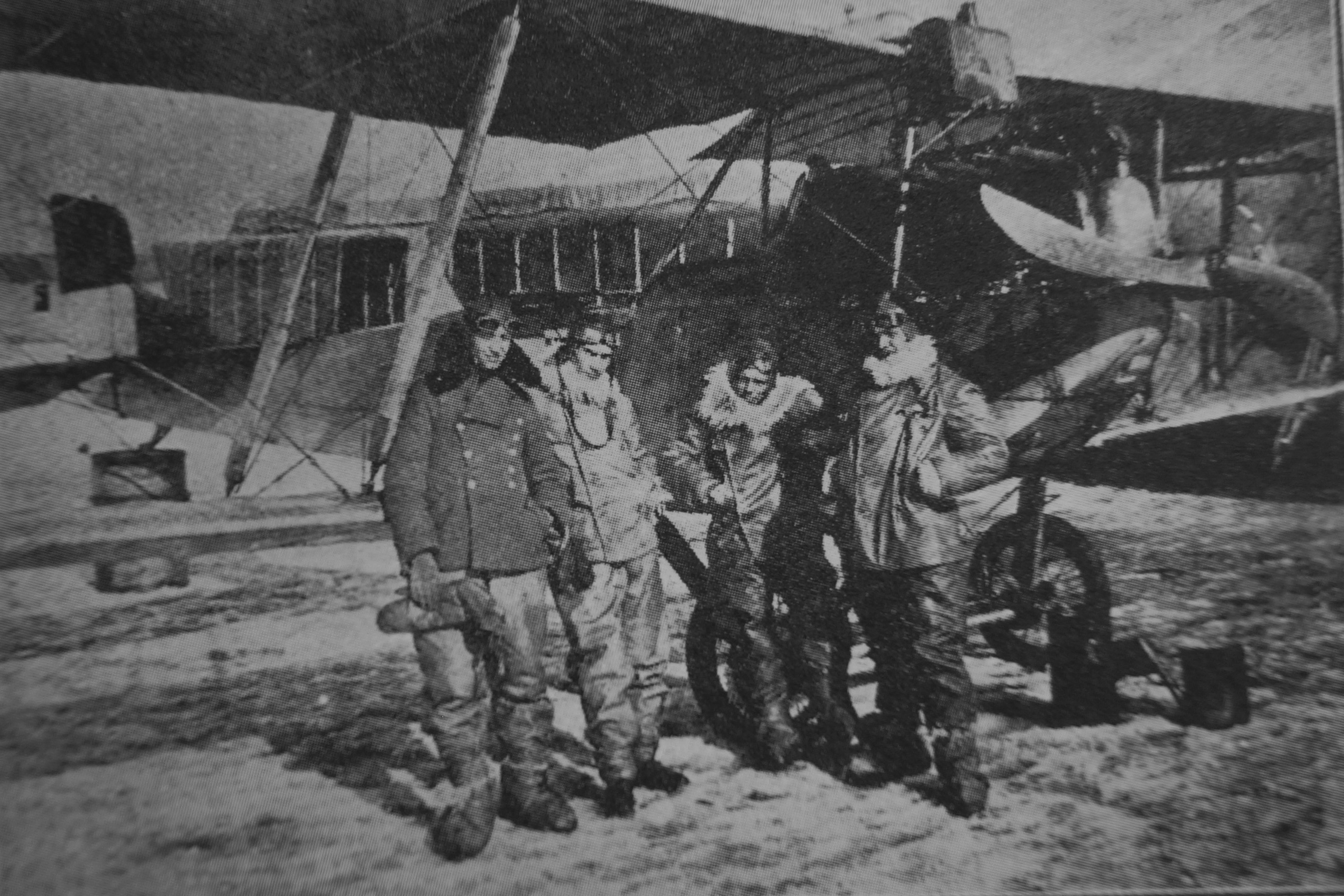 6 eskadra wywiadowcza - "Eskimosy" - por. obs. Józef Wojciechowski, sierż. pilot Stefan Małaczyński, ppor. pilot Stanisław Pietruski, ppor. obs. Tomasz Turbiak